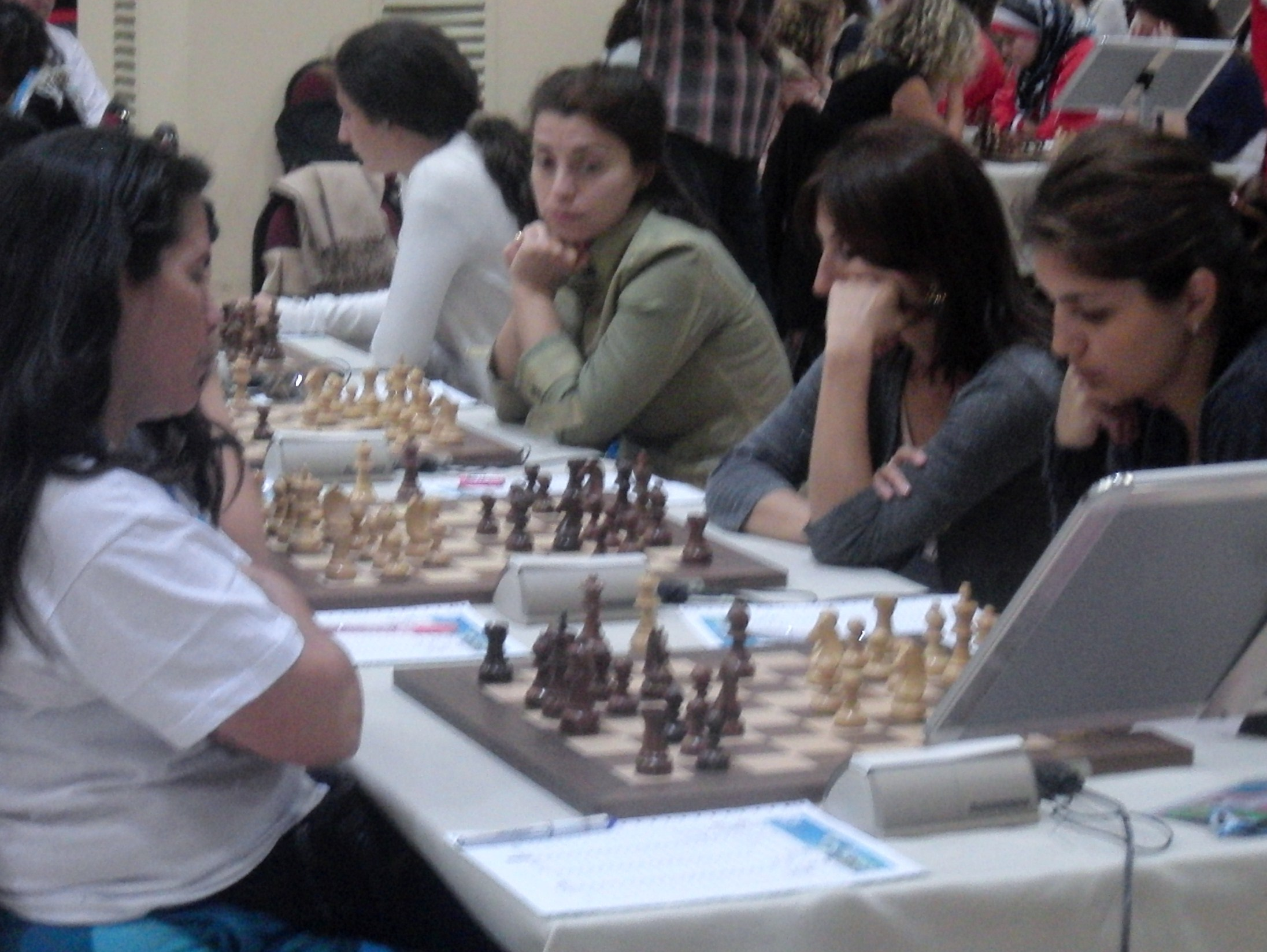 Bolivien - Russland, Schacholympiade 2012 in Istanbul (Runde 1, Tisch 2), auf der rechten Seite das Team von Russland (Bretter 1 bis 4 von rechts nach links).